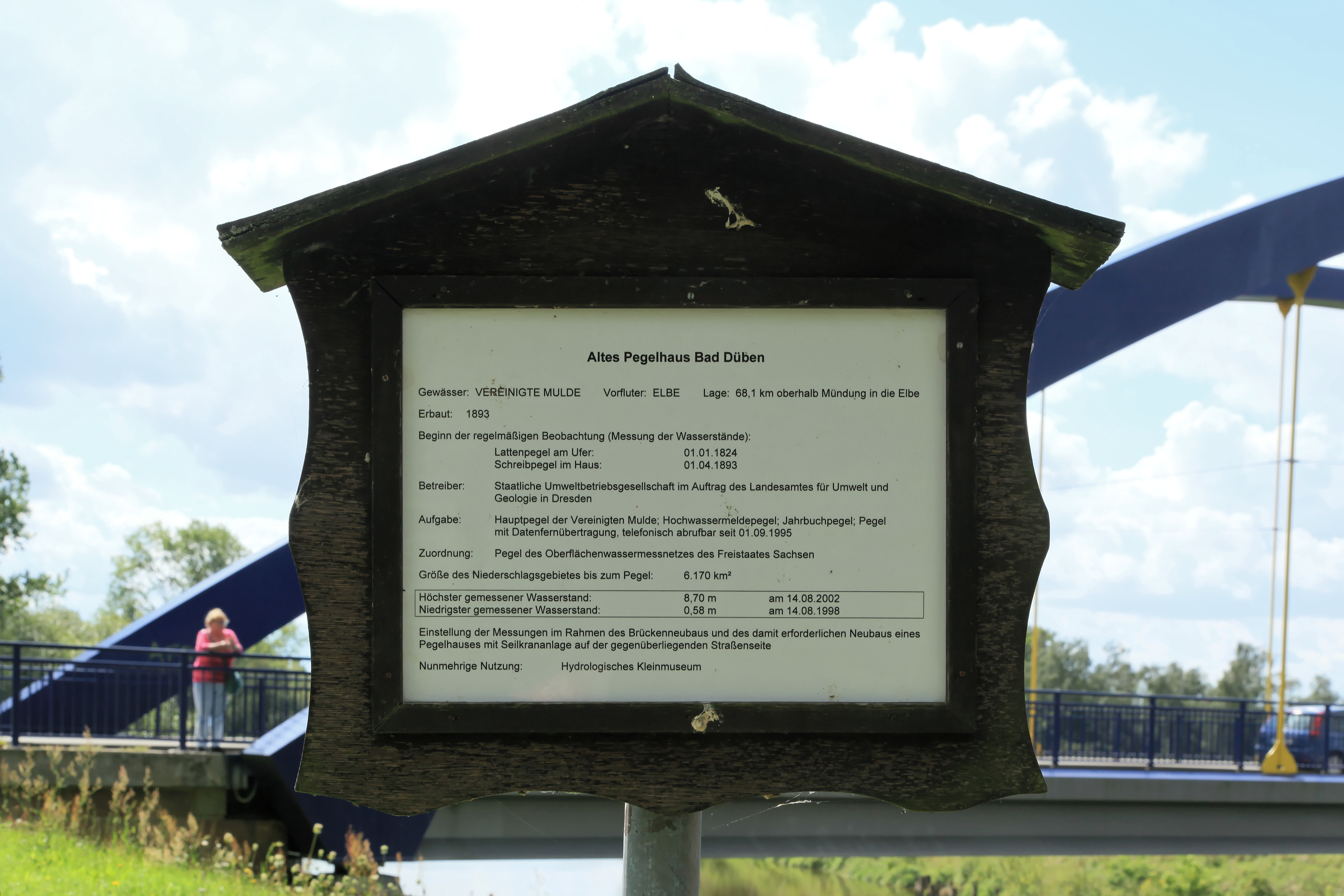 Altes Pegelhaus, Leipziger Straße in Bad Düben)